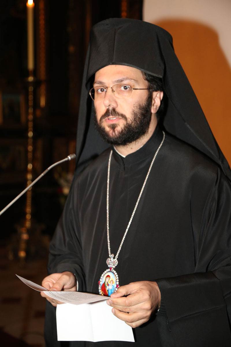 Metropolit Arsenios (Kardamakis)-3631